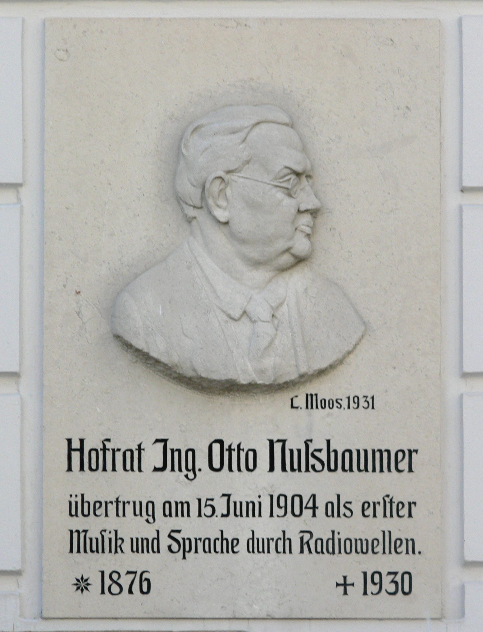 Gedenktafel für Otto Nußbaumer an der Neuen Residenz (Residenzplatz, Salzburg)